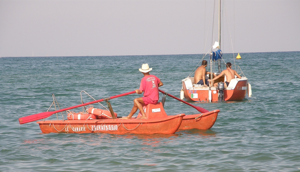 Pescara